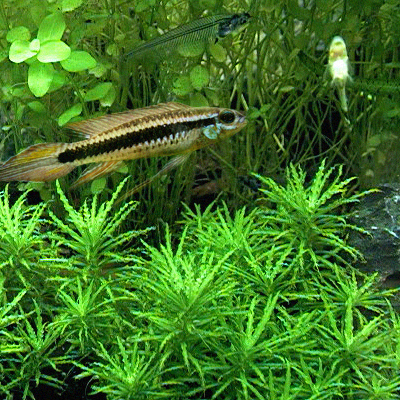 Taeniacara candidi adult